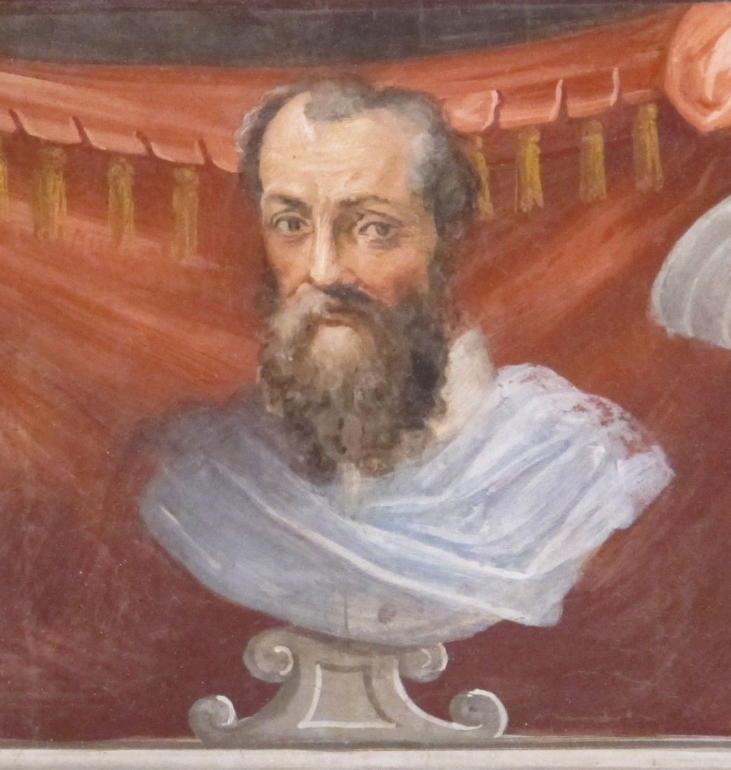 Casa vasari FI, salone, parete camino 04 a ritratto giorgio vasari